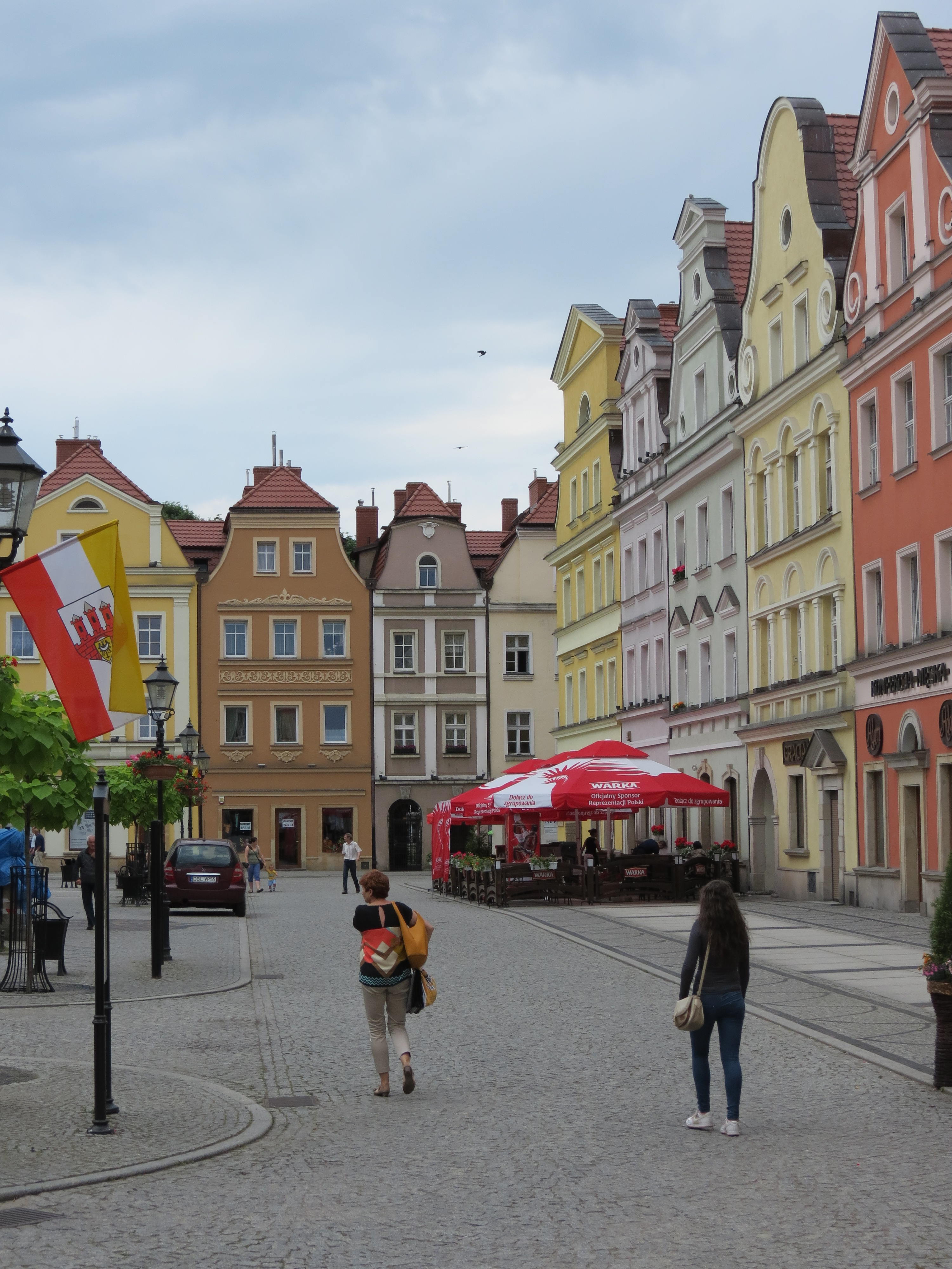 Bolesławiec, ośrodek historyczny miasta